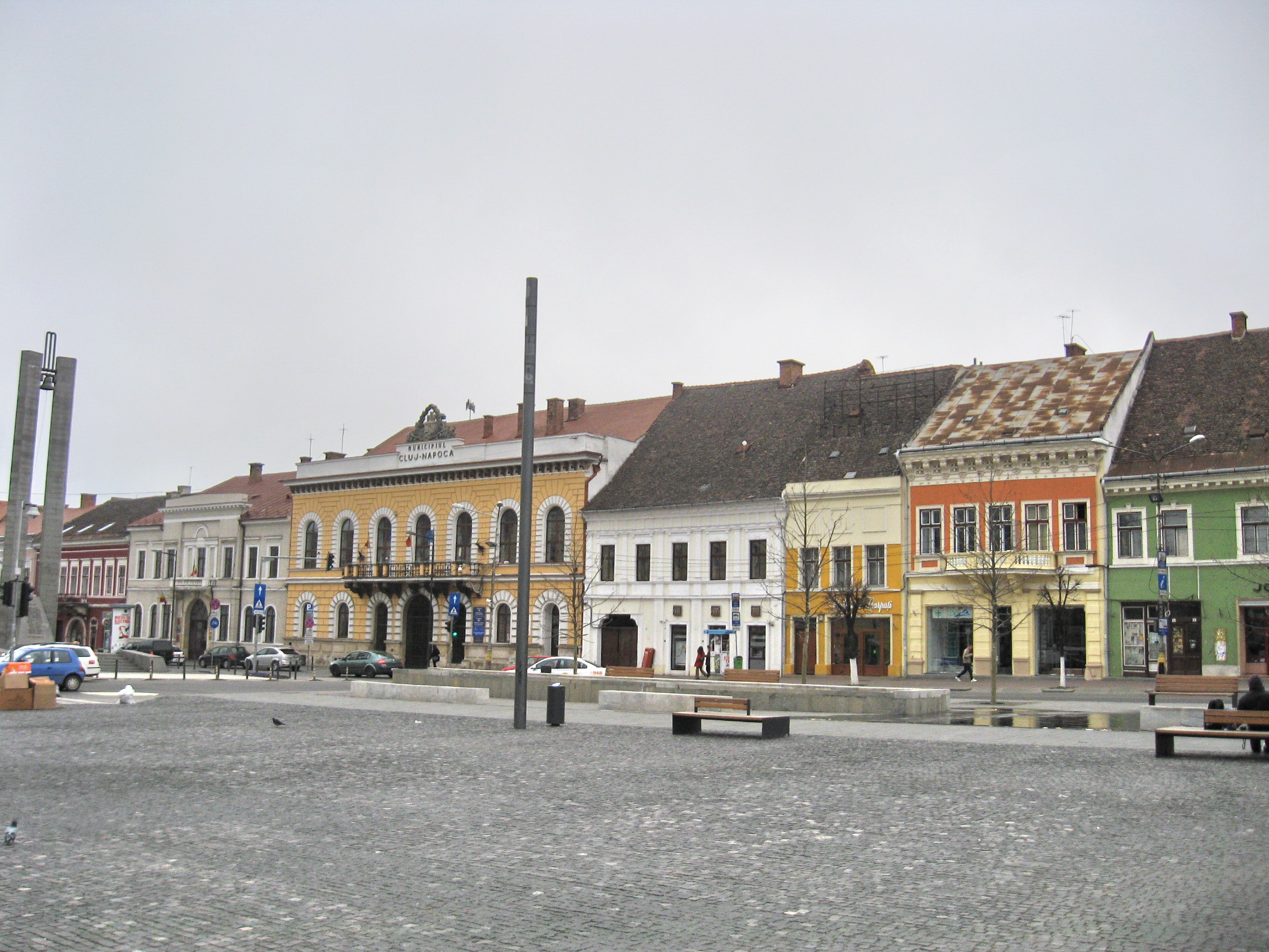 Cluj-Napoca, Piaţa Unirii